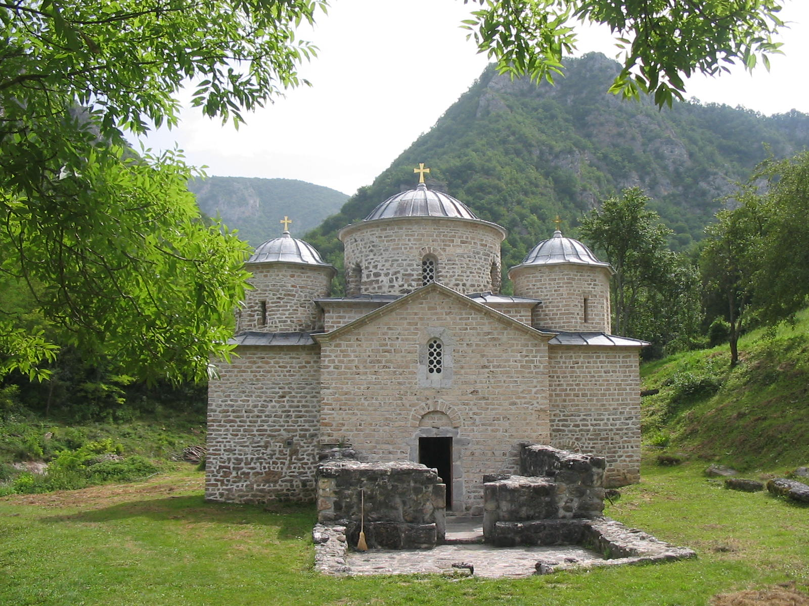 Serbian orthodox monastery of Davidovica near Prijepolje, Serbia/Le monastère orthodoxe serbe de Davidovica près de Prijepolje, Serbie